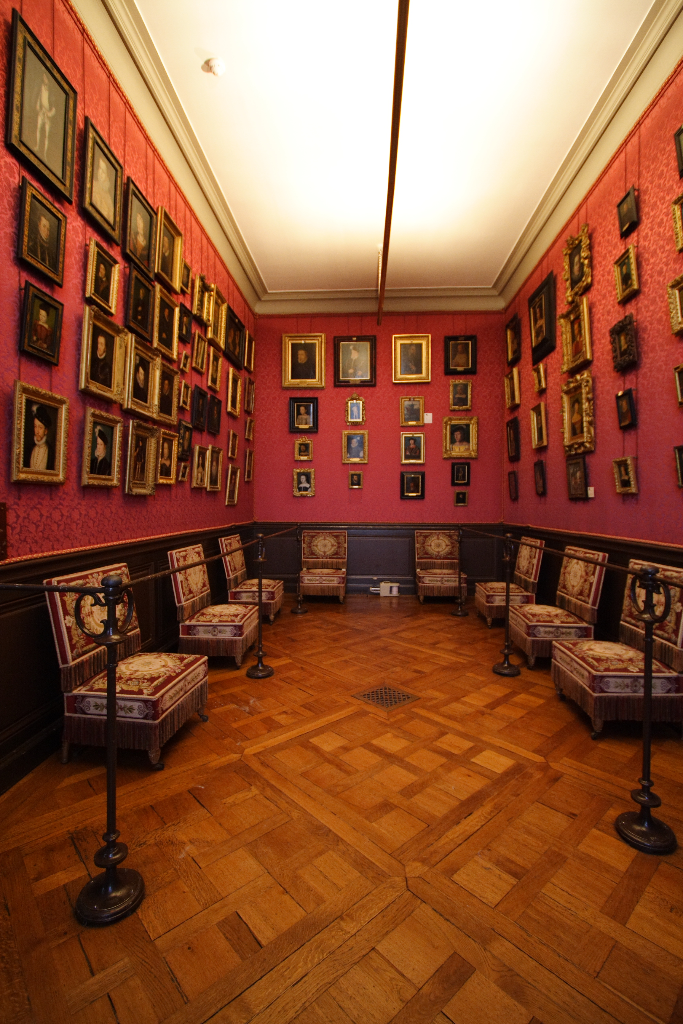 Le cabinet des Clouet, musée Condé (Chantilly, France)